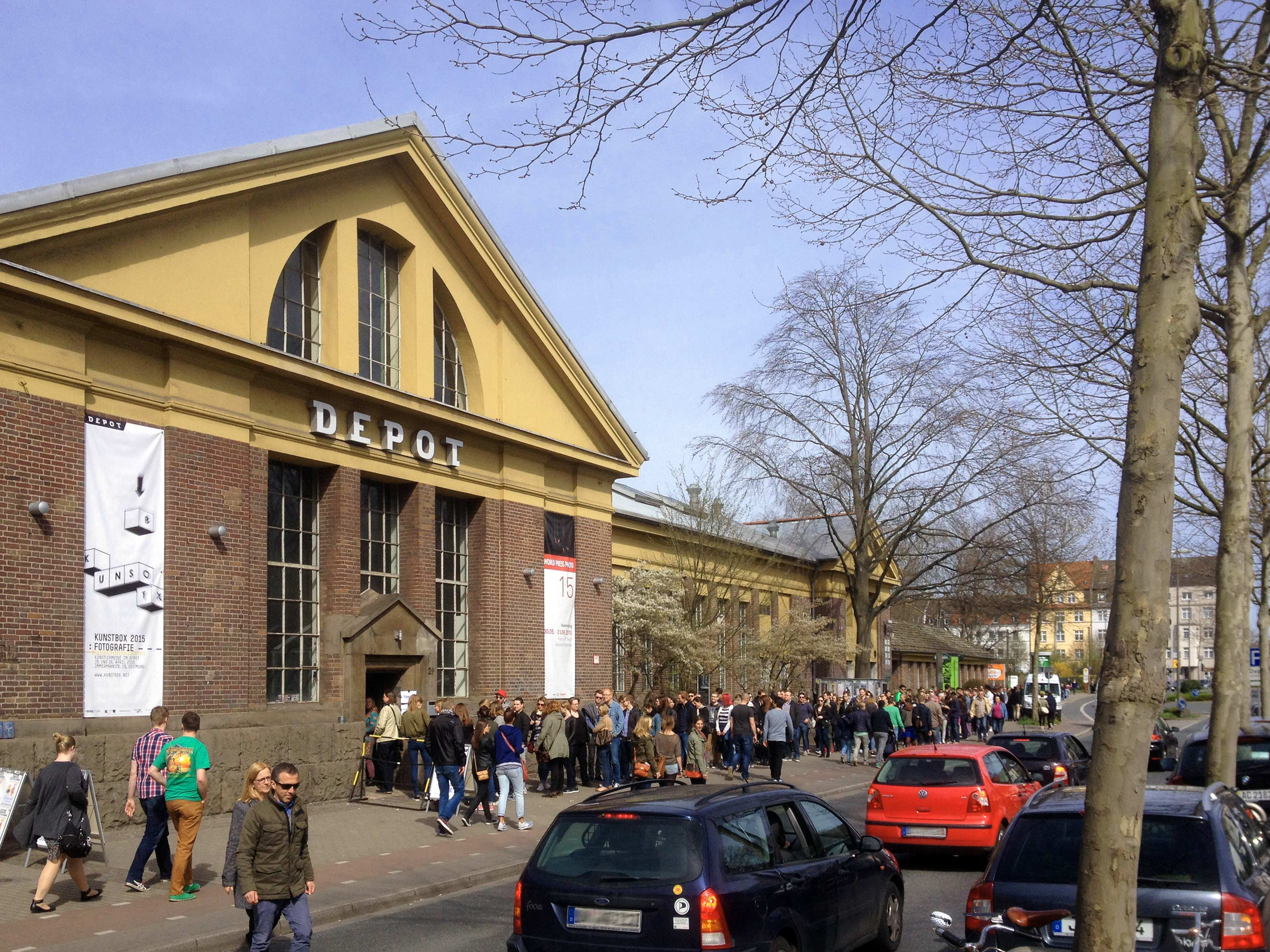 Andrang vor der Kasse